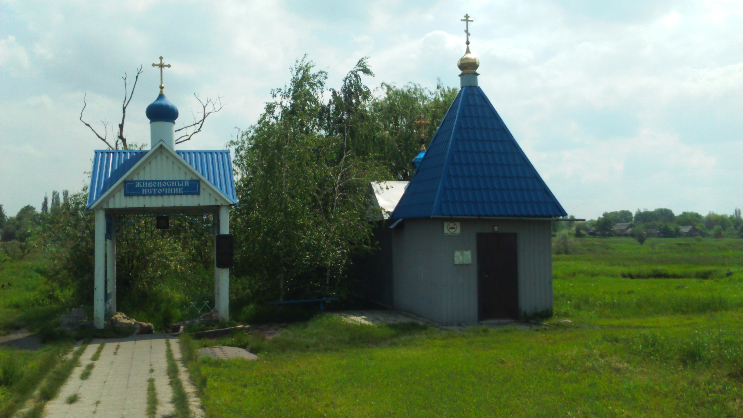 Живоносне джерело Святогорівка Добропільський район